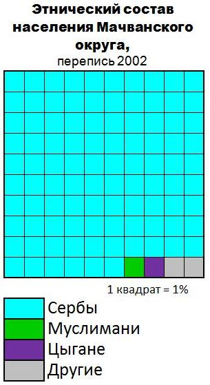 Этнический состав населения Мачванского округа (Сербия)